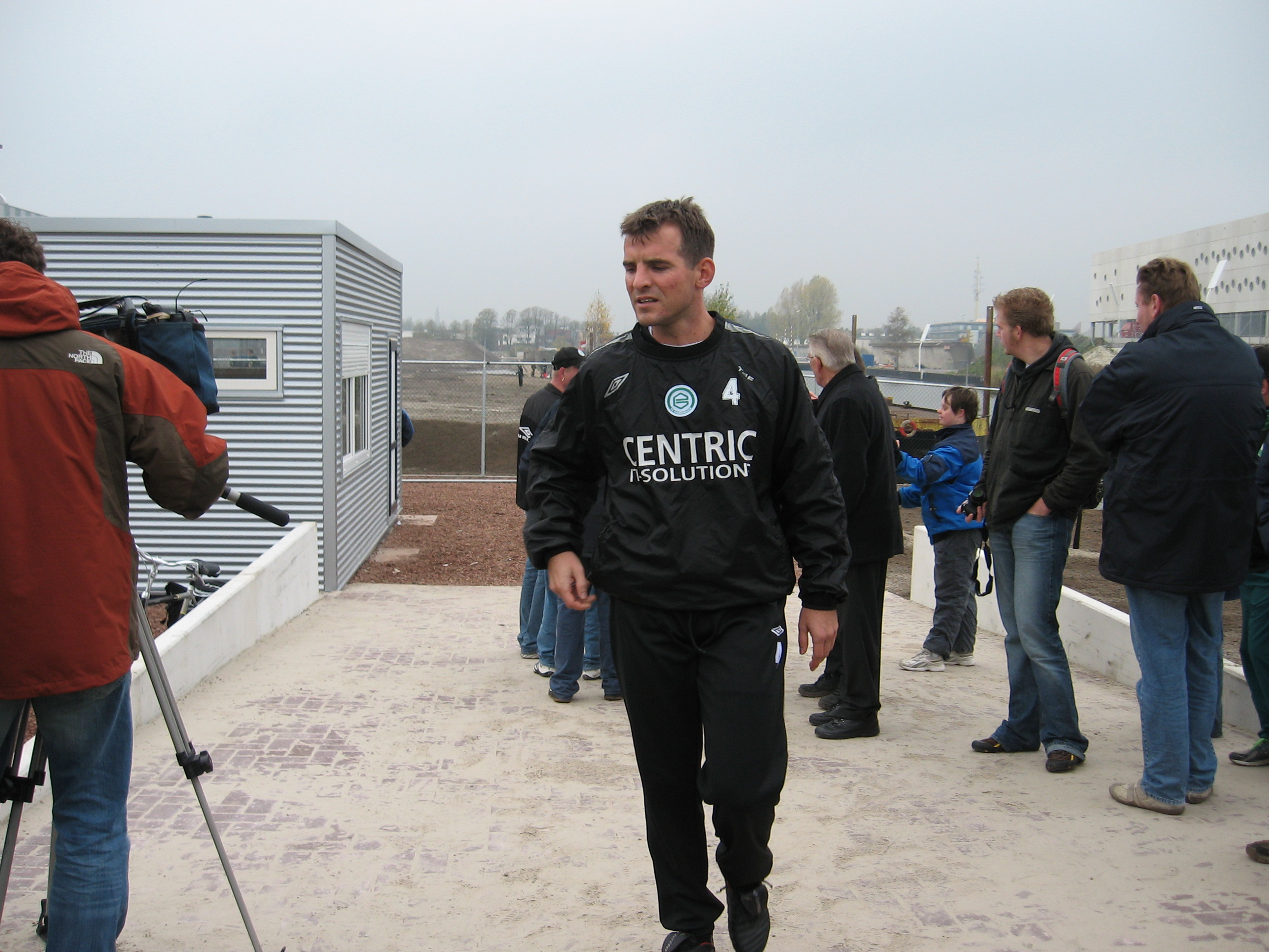 FC Groningen-speler Paul Matthijs